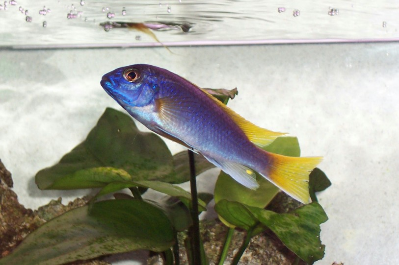 Pseudotropheus Acei Mâle